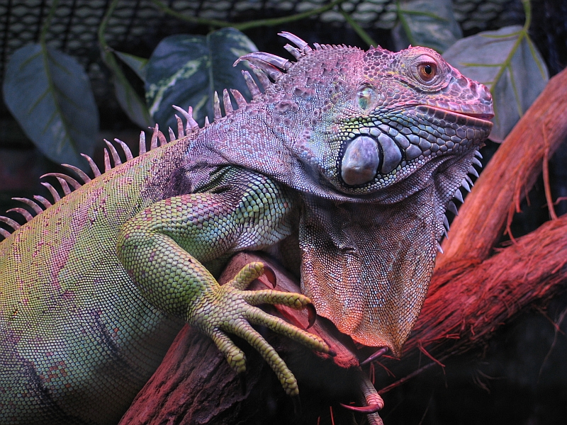 Iguana iguana